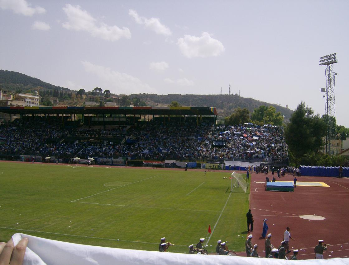 publique tlemcenien a birouana